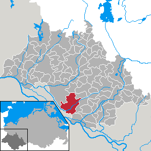 Vielank in Mecklenburg-Vorpommern - district Ludwigslust